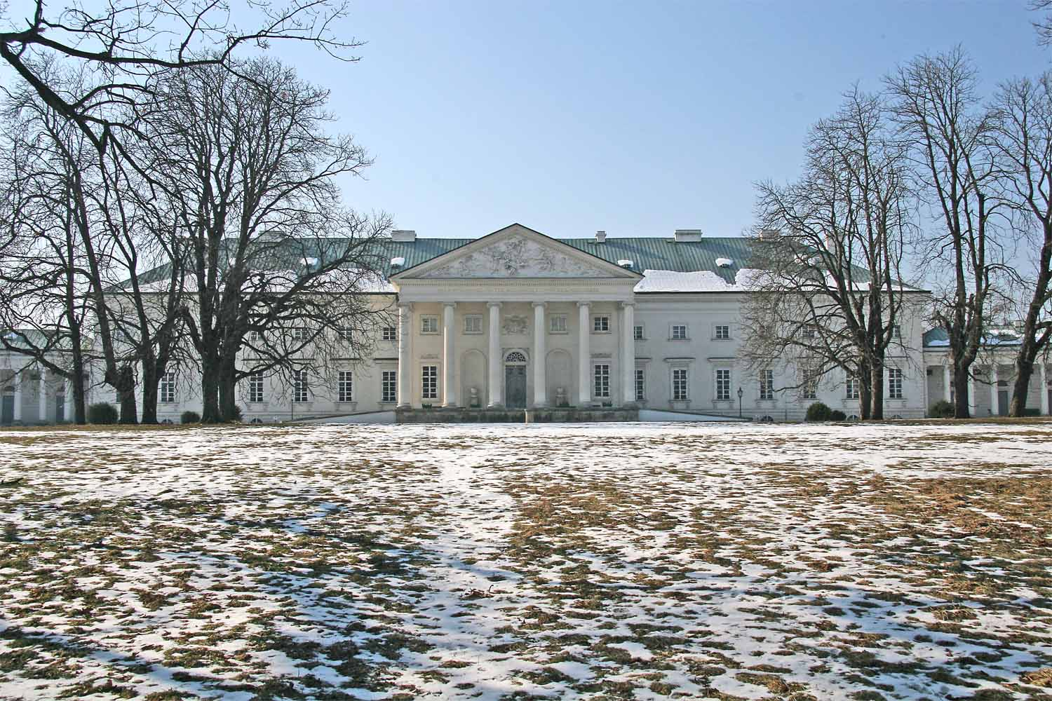 Chateau Kačina